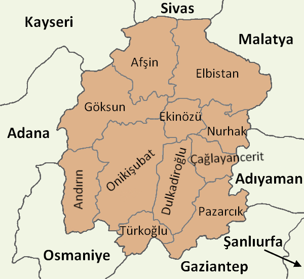 Kahramanmaraş'ın ilçeleri